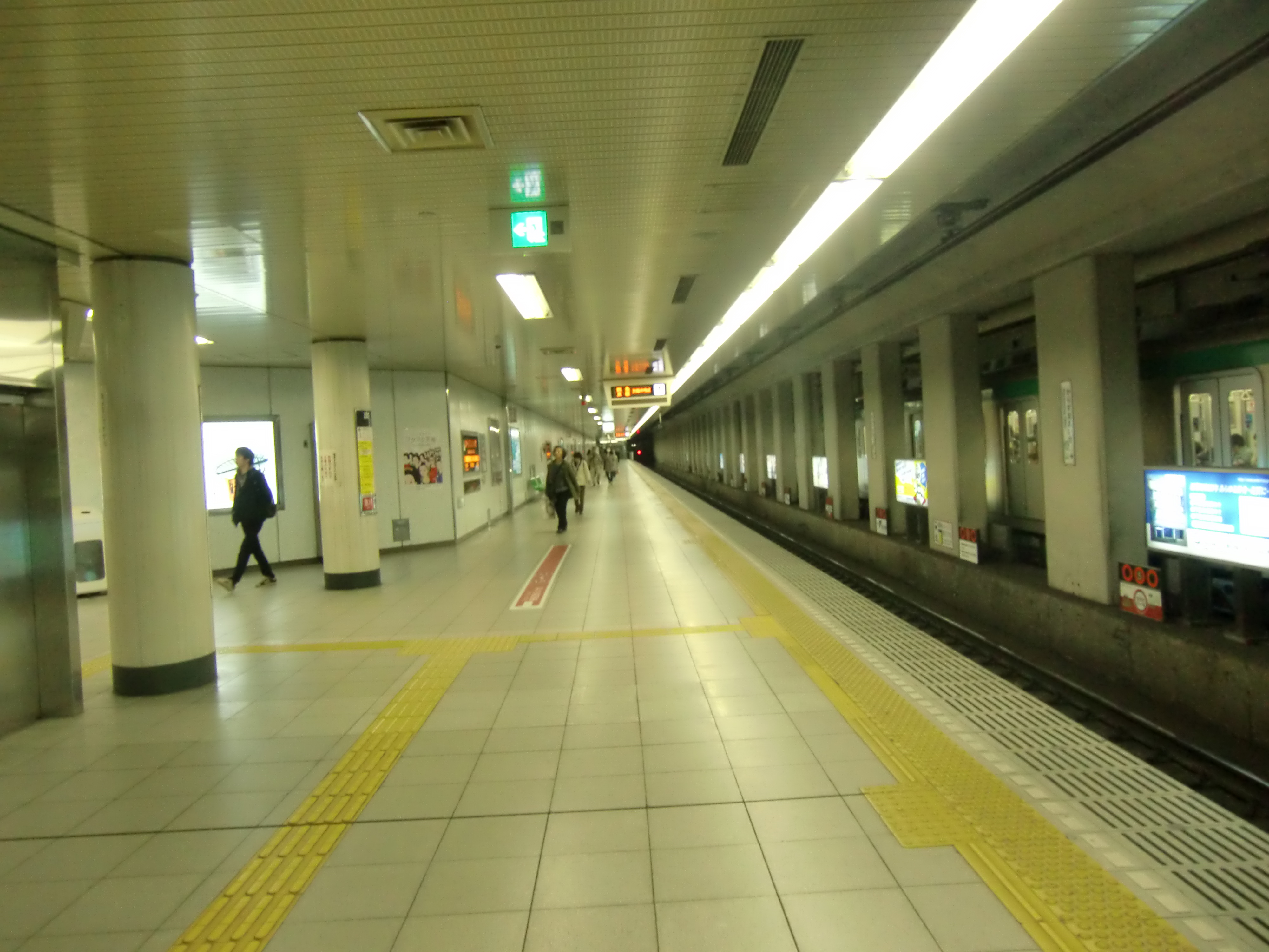 ２０１２年３月２７日撮影